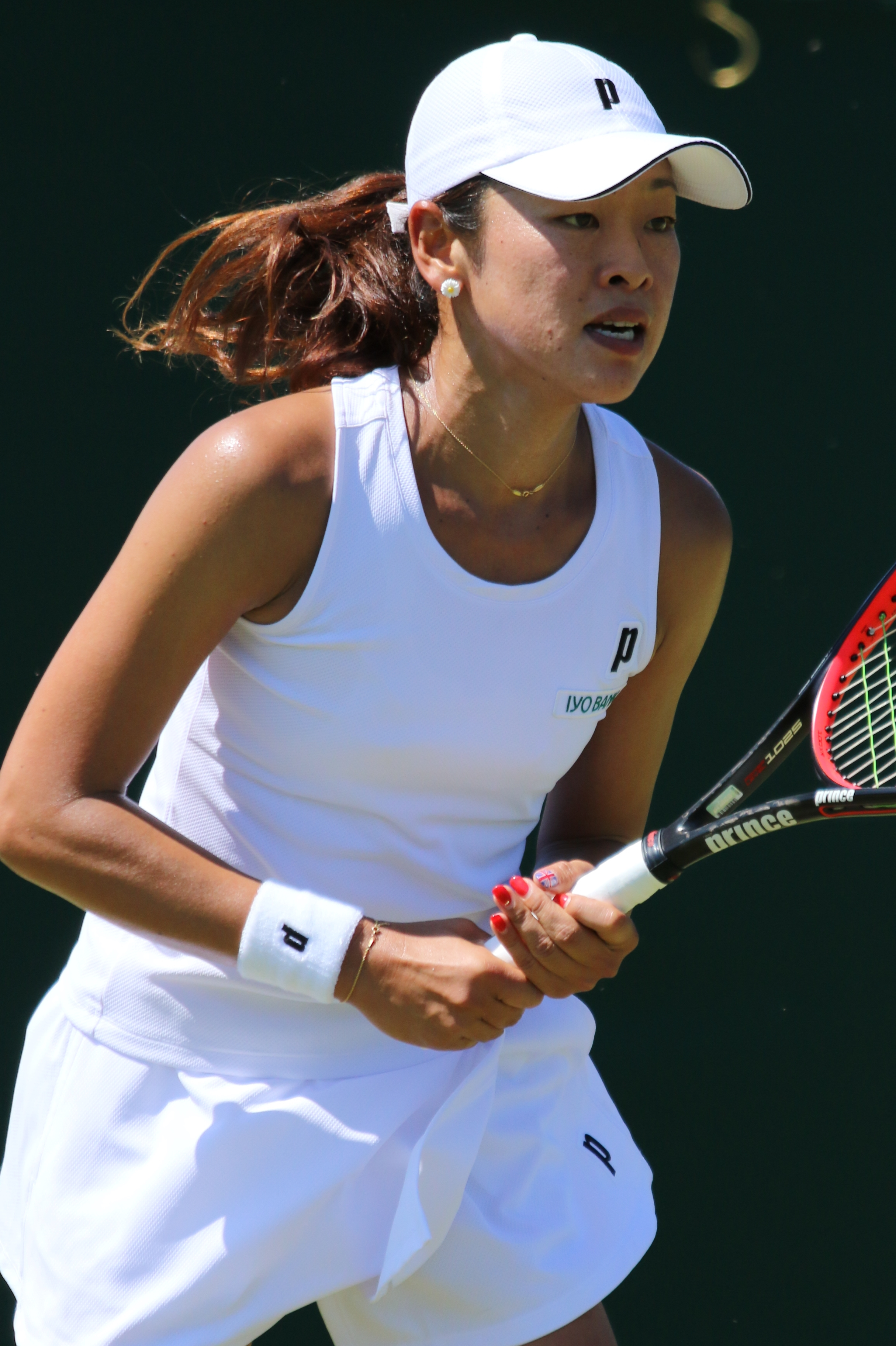 Namigata WMQ18 (22)